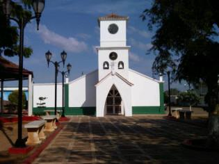 Iglesia Inmaculada Concepción de Capatárida